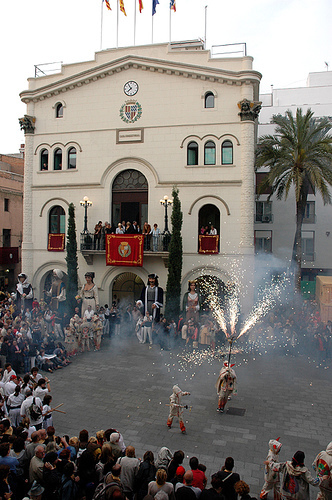 Diables, llucifer i Gegants a la Plaça de la Vila (Badalona).